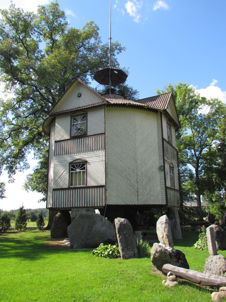 Adomo Petrausko muziejus